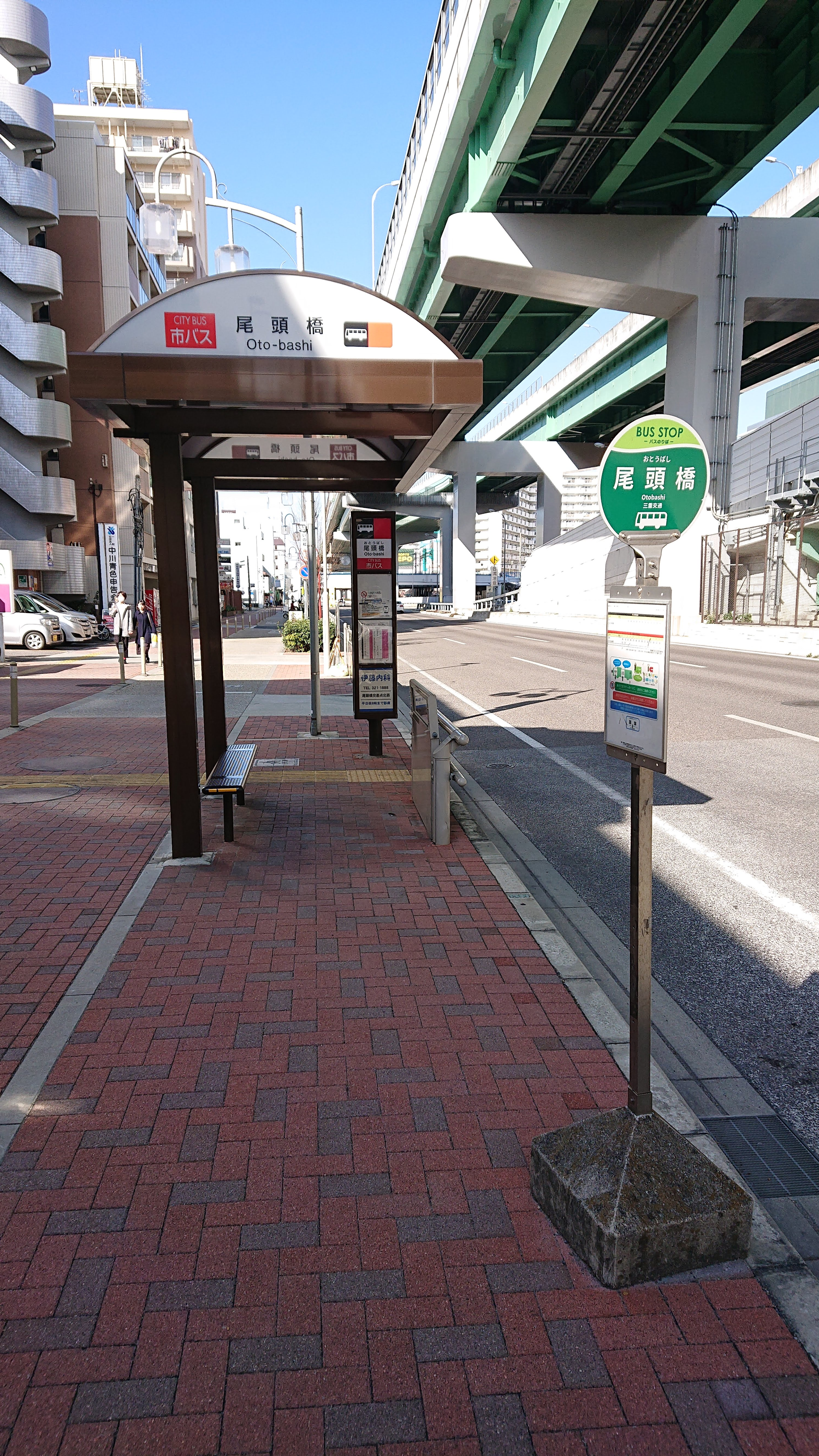 名古屋市営バス・三重交通尾頭橋停留所